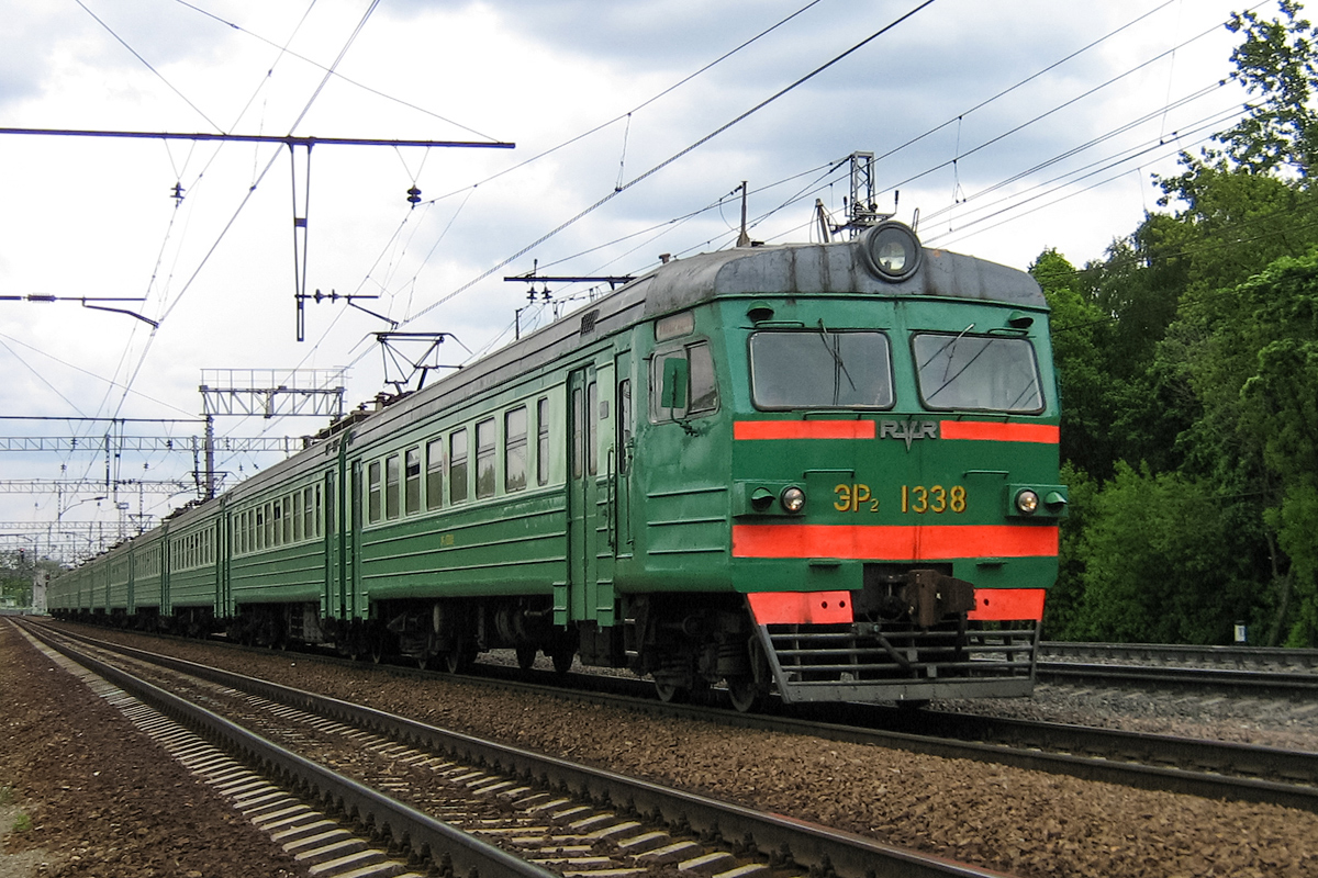 Электропоезд ЭР2-1338. Построен в 12-вагонной составности в апреле-мае 1984 года С завода поступил на Московскую ж. д. в ТЧ-18 имени Ильича 05.07.1989 — передан в ТЧ-7 Раменское весной 2008 — направлен на участок Рыбное ТЧ-7 Раменское __.05.2013 — передан в ТЧ-17 Нахабино (после ТР-3) 11.09.2017 — передан в ТЧ-22 Новомосковск-I (после КР-1) Ремонт: __.2010 — КР-1 ОАО «Московский ЛРЗ» 05.2013 — ТР-3 ТЧ-2 Пермь, перекрашен в корпоративные цвета ОАО «РЖД» 08.2017 — КР-1 АО «Красноярский ЭВРЗ» Вагон 133805 сгорел в 2007 г. на пл. Загорново, взамен работал вагон 208703